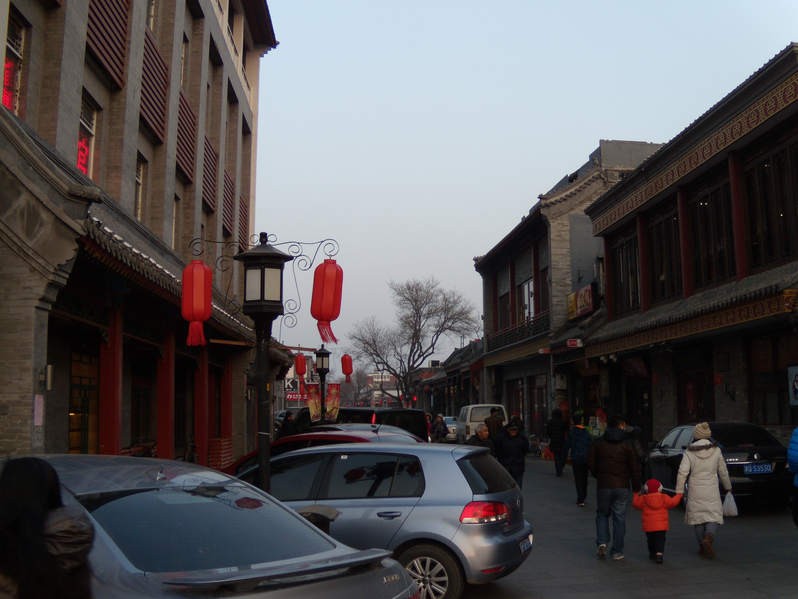 护国寺街